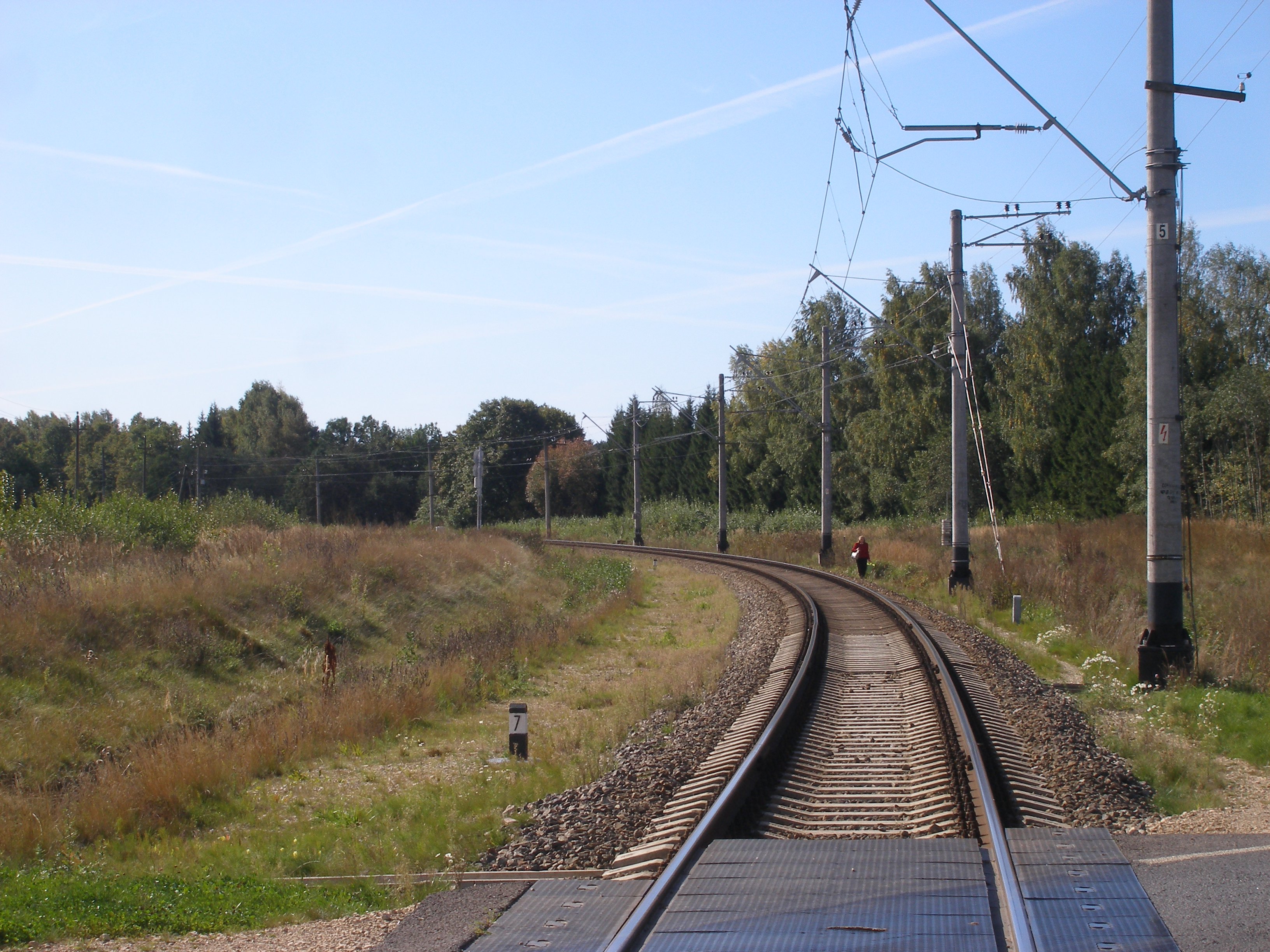 Dzelzceļa līnija Rīga - Skulte posmā Skulte - Zvejniekciems.